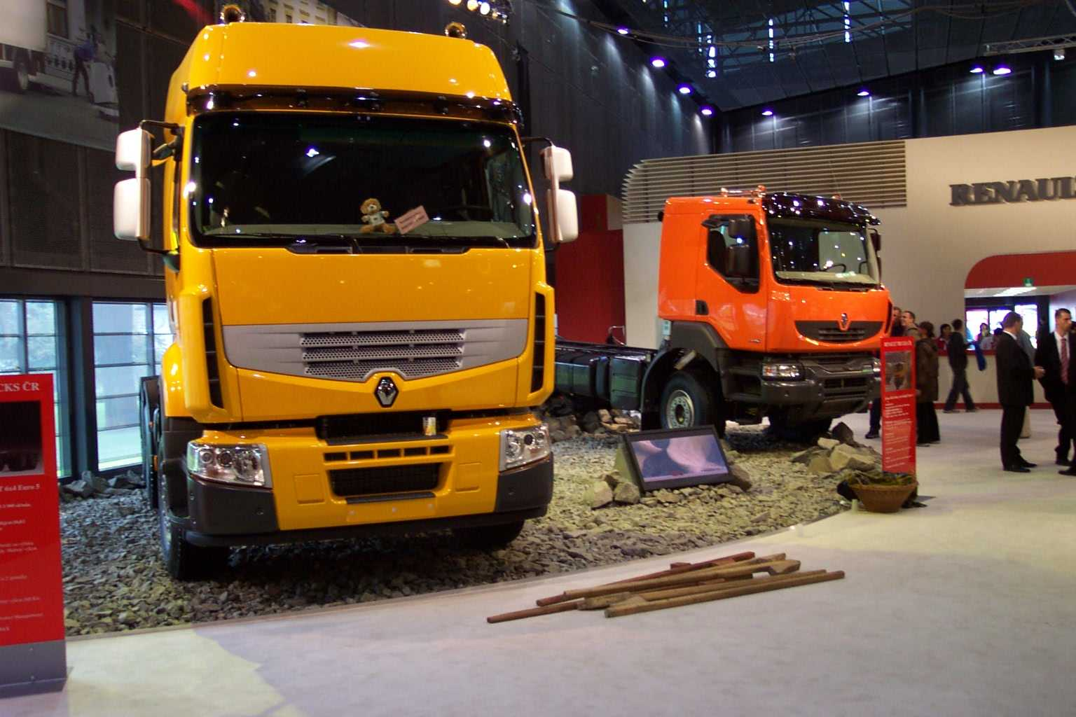 Truck Renault at Brno Autotec fair - Nákladní automobil Renault na veletrhu Autotec v Brně